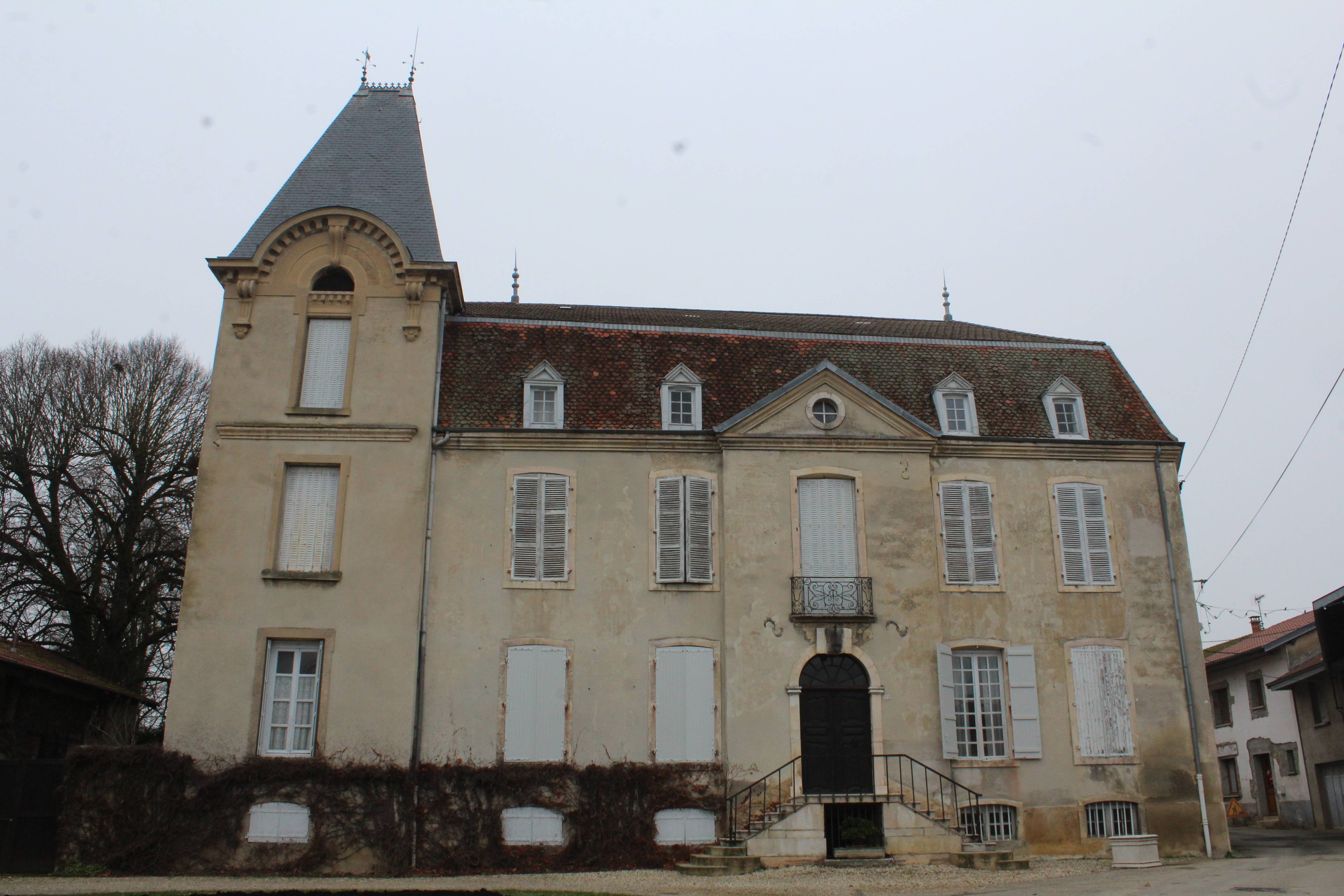 Château de Chevigney sur la place du Chapitre de Neuville-les-Dames.